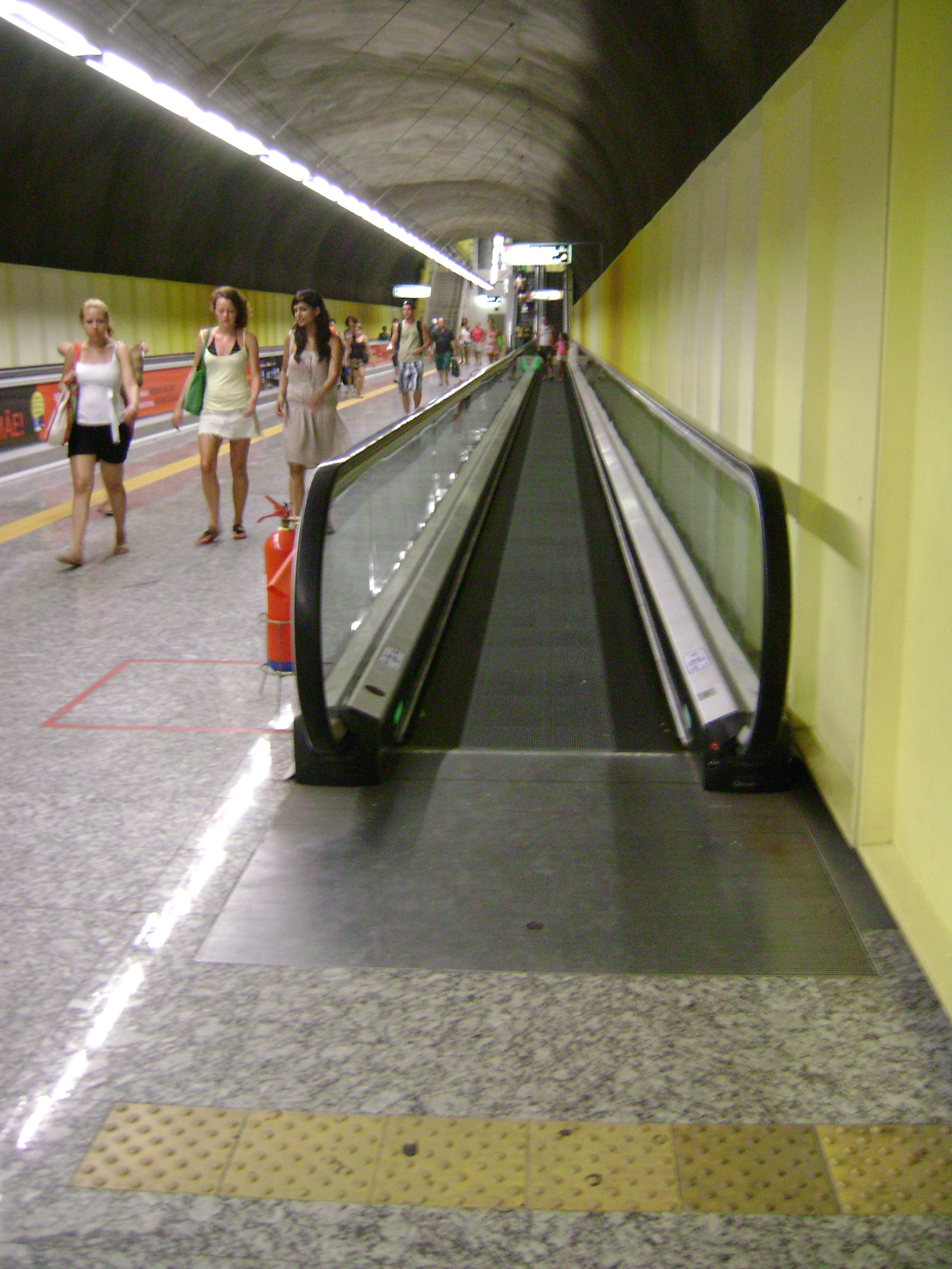 Esteira rolante na estação de metrô Ipanema / General Osório, na cidade do Rio de Janeiro, Brasil.